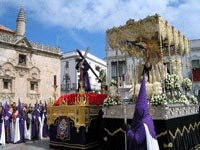 Cofradia de Jesus de Nazaret